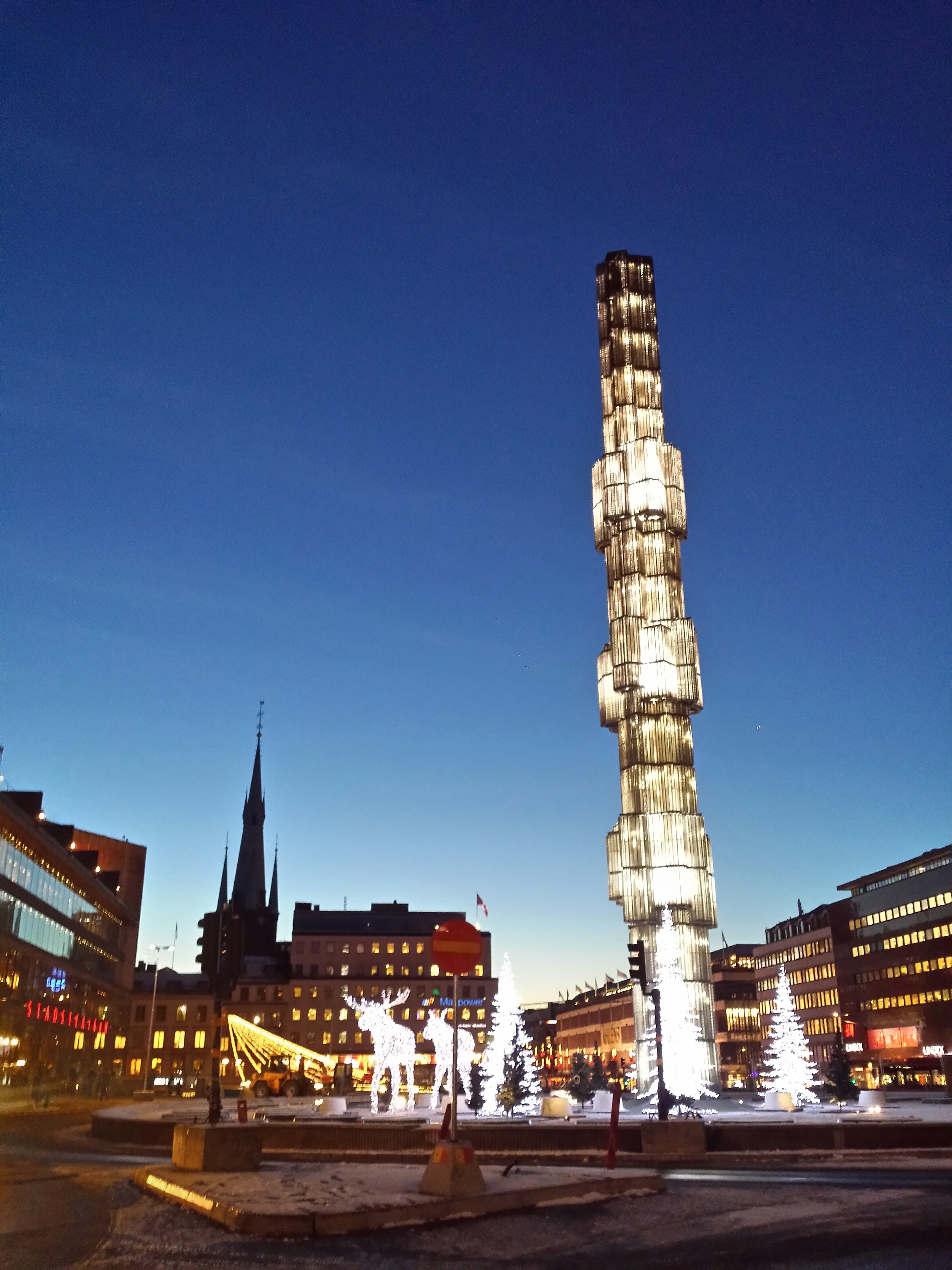 Der Sergels Torg Platz in Stockholm, Schweden während der Blauen Stunde im Winter